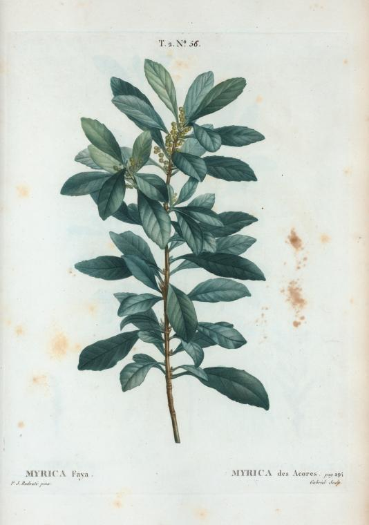 Myrica Faya = Myrica des Acores.